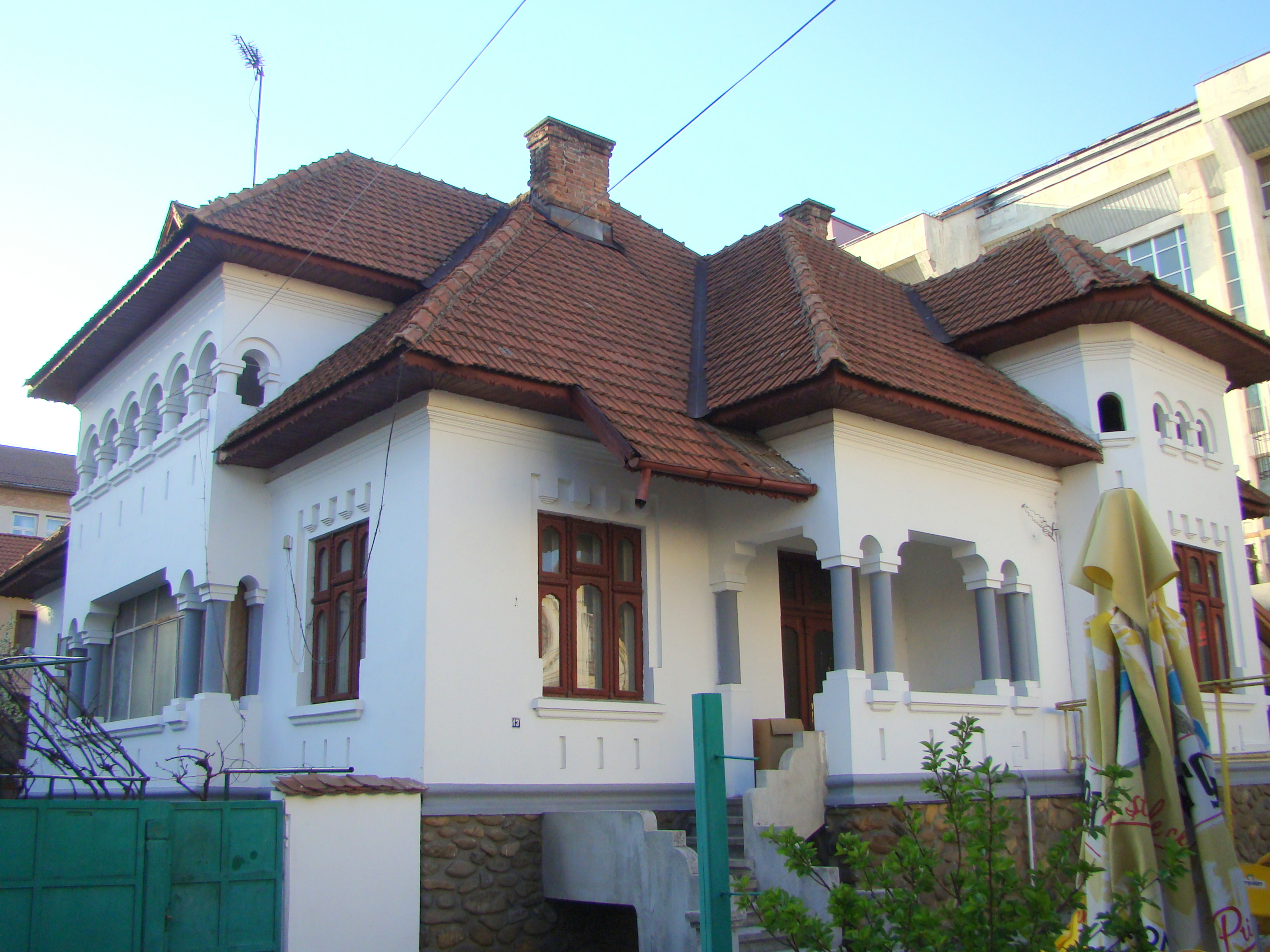 Casa Gherghe, municipiul Târgu Jiu, str. Geneva 13A